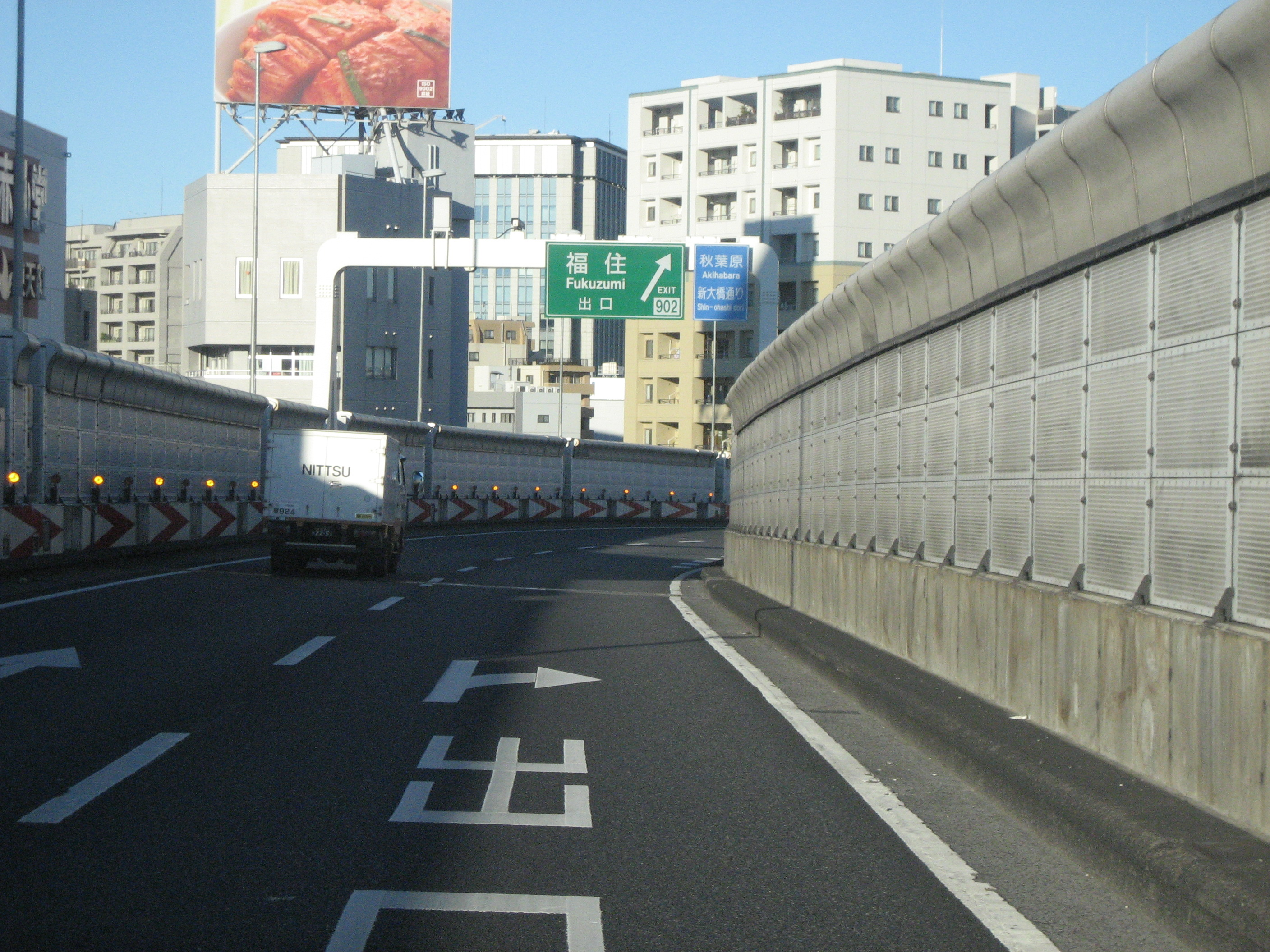 首都高速福住出入口